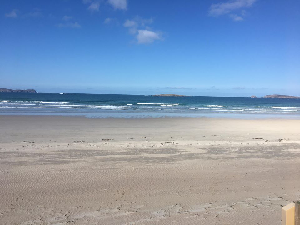 An trá i gContae Dhún na nGall